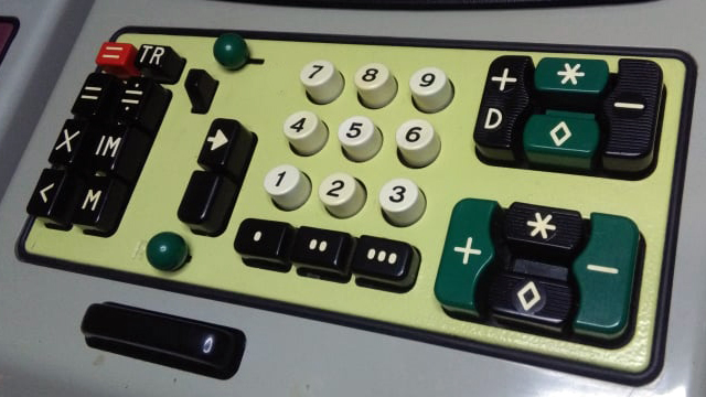 Dettaglio di una tastiera di una calcolatrice Tetractys 24 della Olivetti